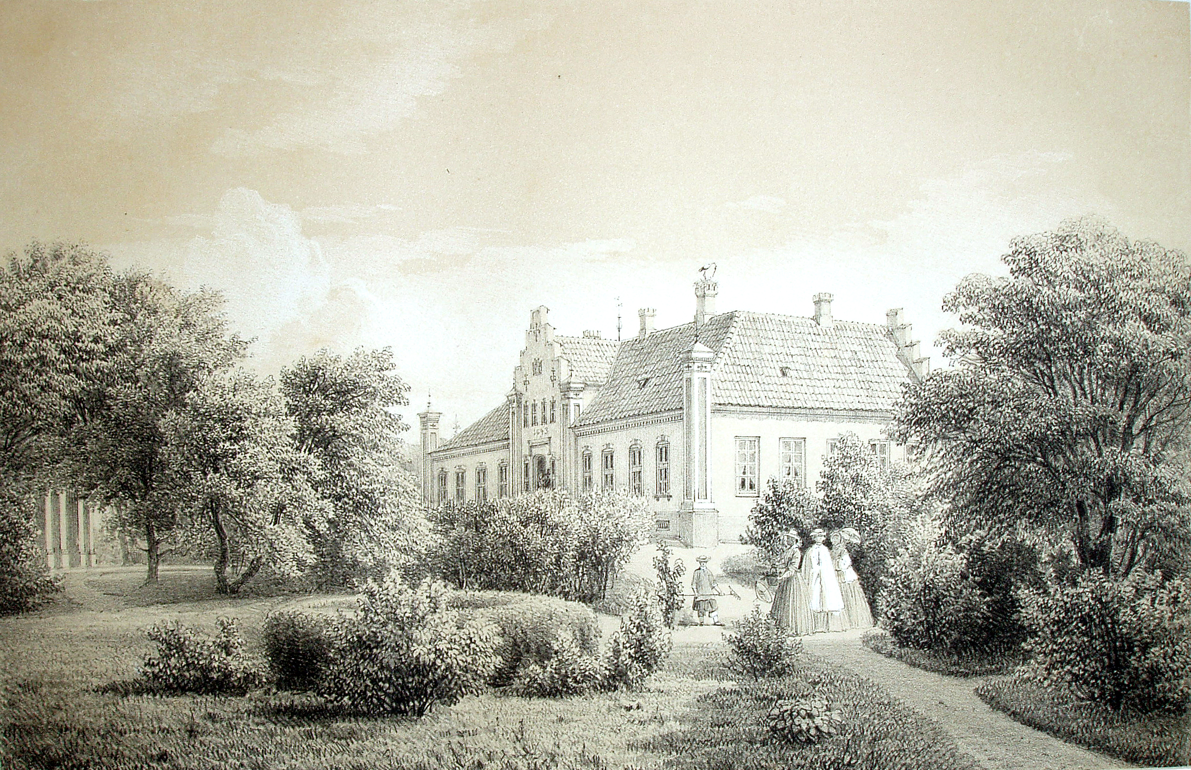 Kyø Hovedgård er en gammel hovedgård, som nævnes første gang i 1400. Gården ligger i St. Ajstrup Sogn, Slet Herred, Ålborg Amt, Nibe Kommune.